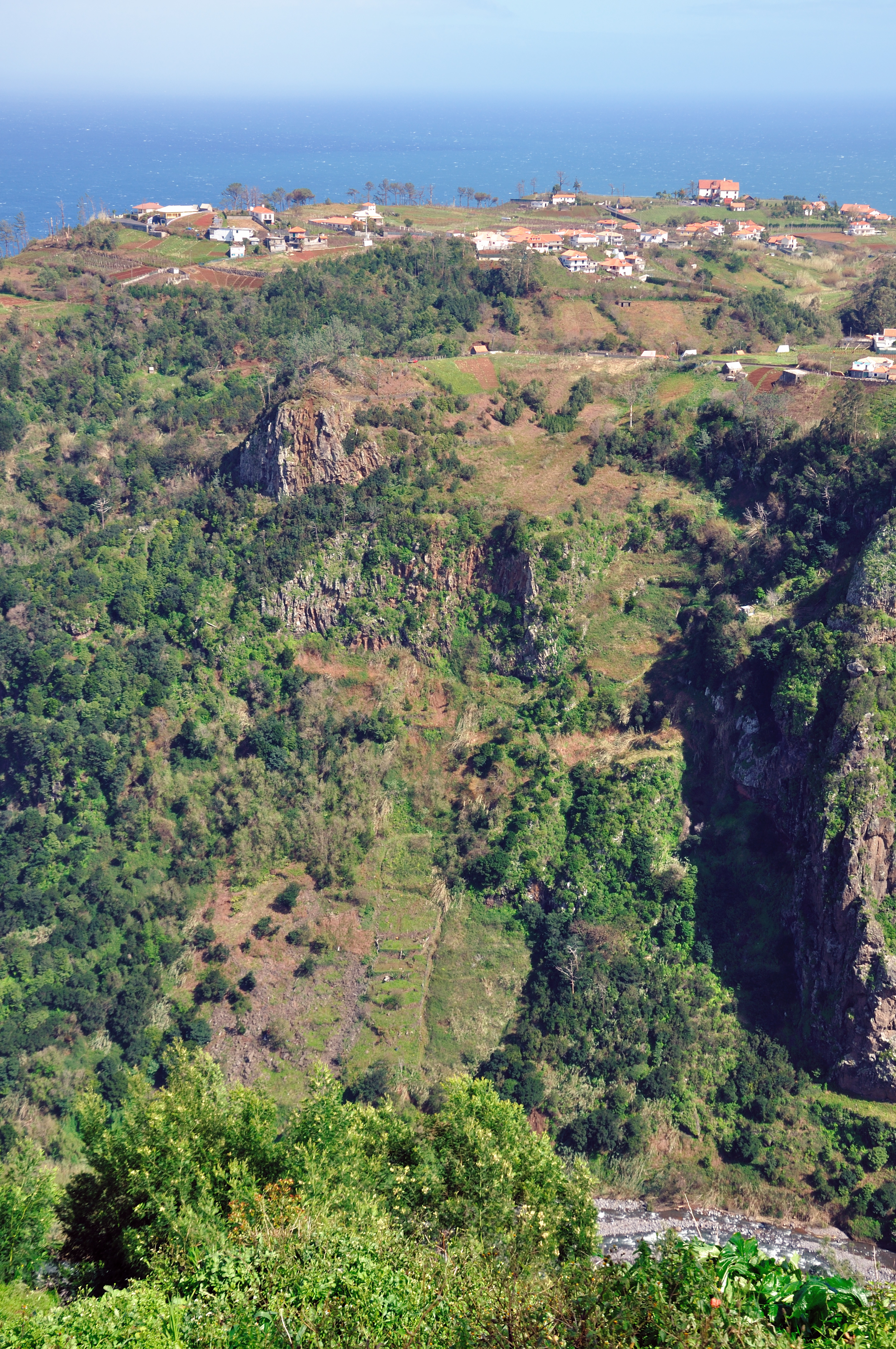 Portugal, Madeira, views in São Jorge